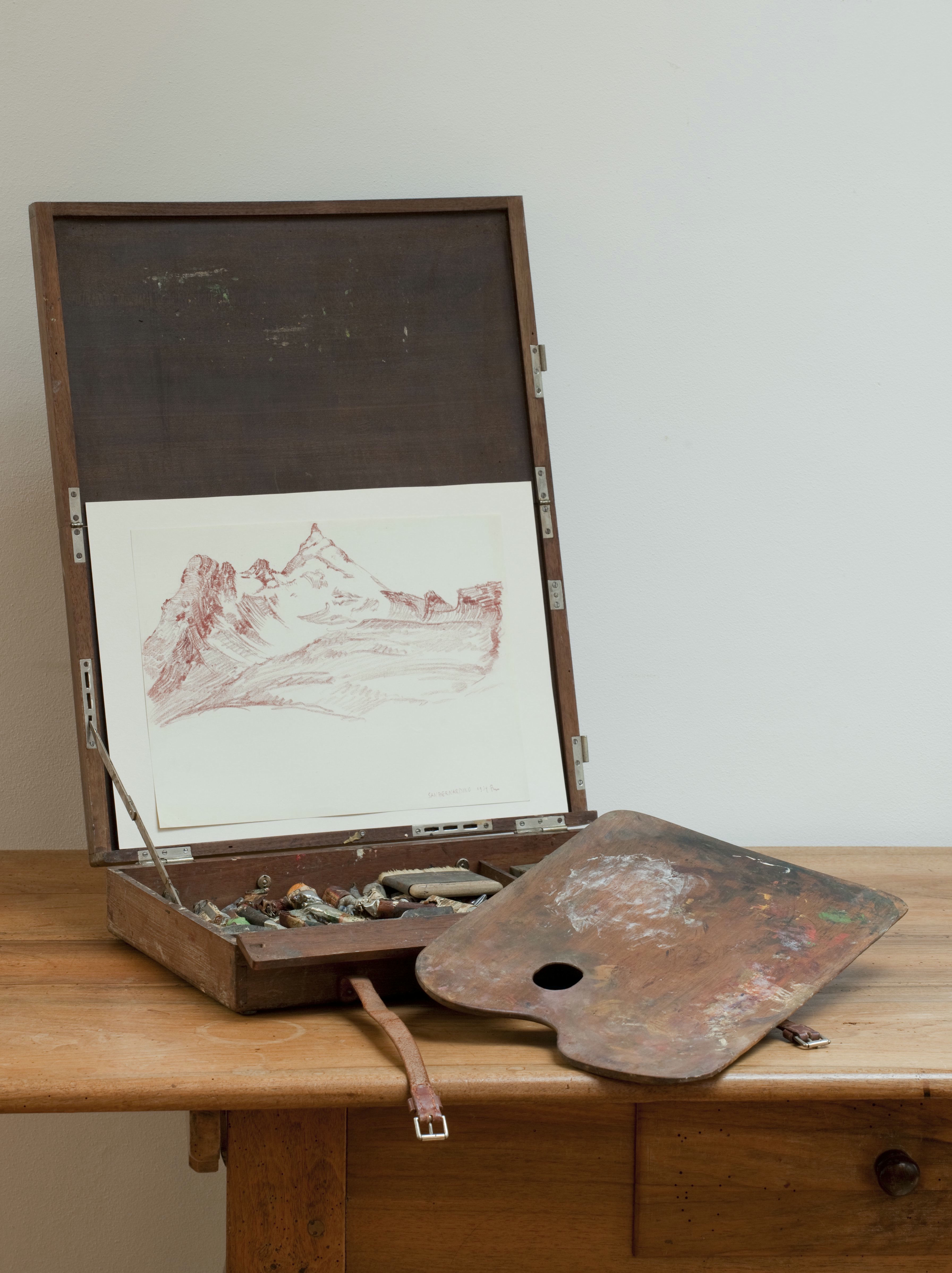 Schilderkist: De schilderkist van Jacob Por in geopende toestand (opmerking: In 2009 in bezit van familie van Jacob Por)